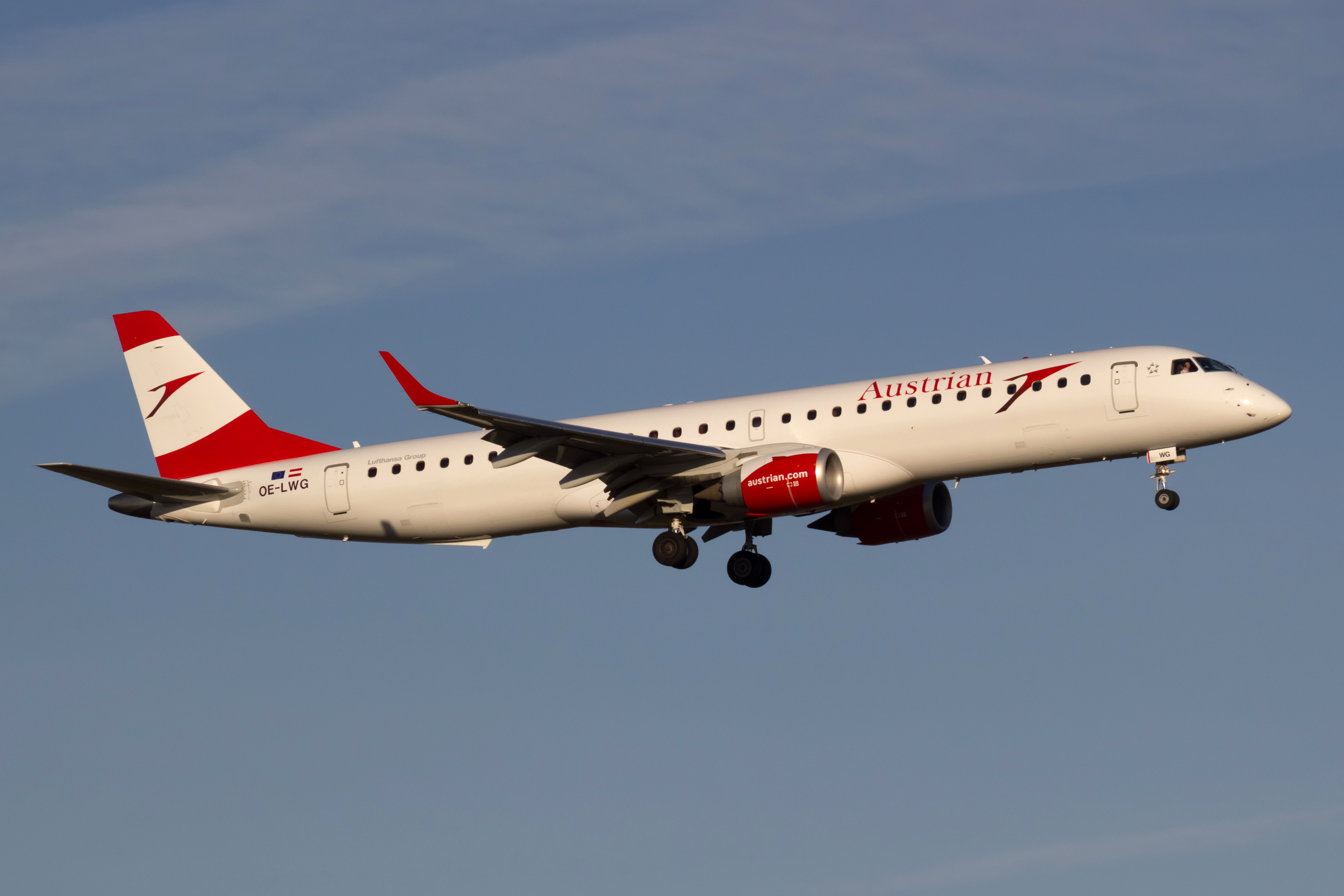 Embraer 195 de Austrian Airlines aterrando no aeroporto de Copenhague.